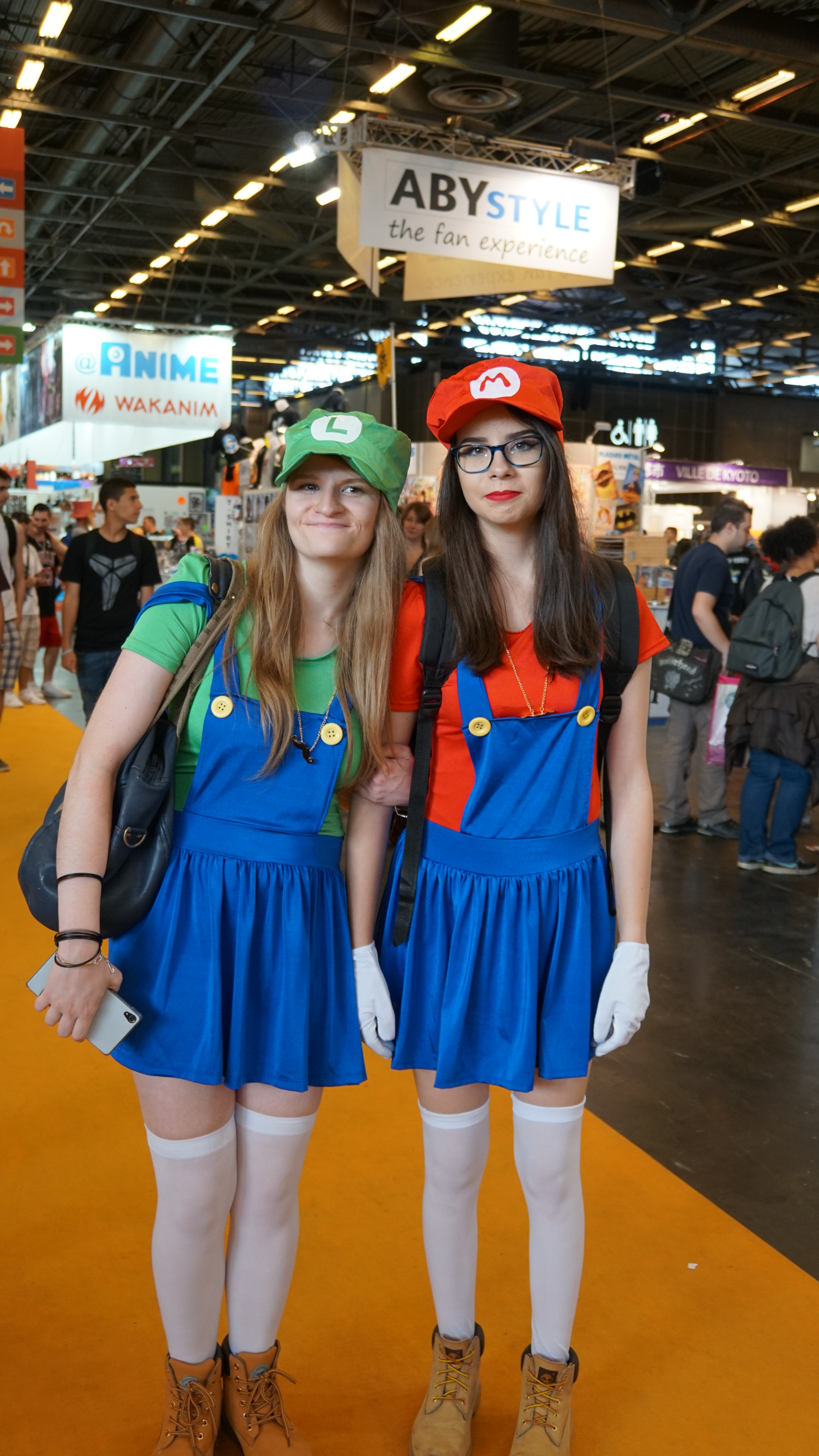 Japan Expo est un salon evenementiel professionnel francais sur la culture populaire japonaise, qui se deroule au parc des expositions de Paris-Nord Villepinte tous les ans en debut du mois de juillet, voire en fin du mois de juin sur une periode de quatre jours. Il s'agit d'une manifestation culturelle consacree aux manga, aux jeux video, aux anime, mais aussi aux arts martiaux, a la mode, a la musique (J-pop, Jrock, traditionnel), au cinema, aux traditions et cultures, aux jeunes artistes et createurs, au sport mecanique.